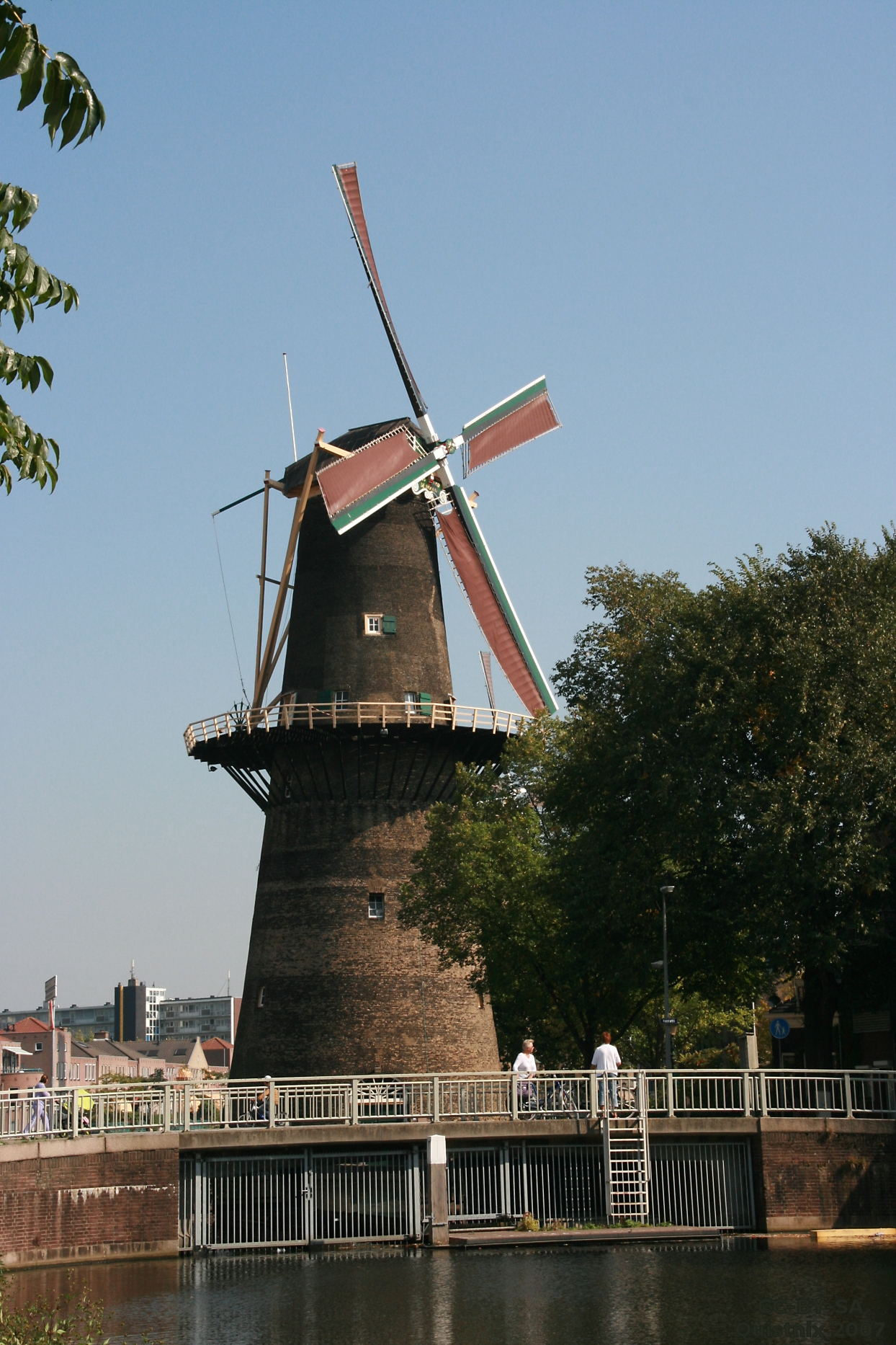 Molen De Noord in Schiedam